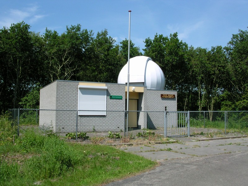 De Cees Buining Sterrenwacht in Noorderhaven (Julianadorp). The Cees Buining Sterrenwacht (observatory) in Noorderhaven (Julianadorp)